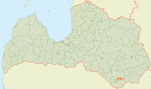 Naujenes pagasts